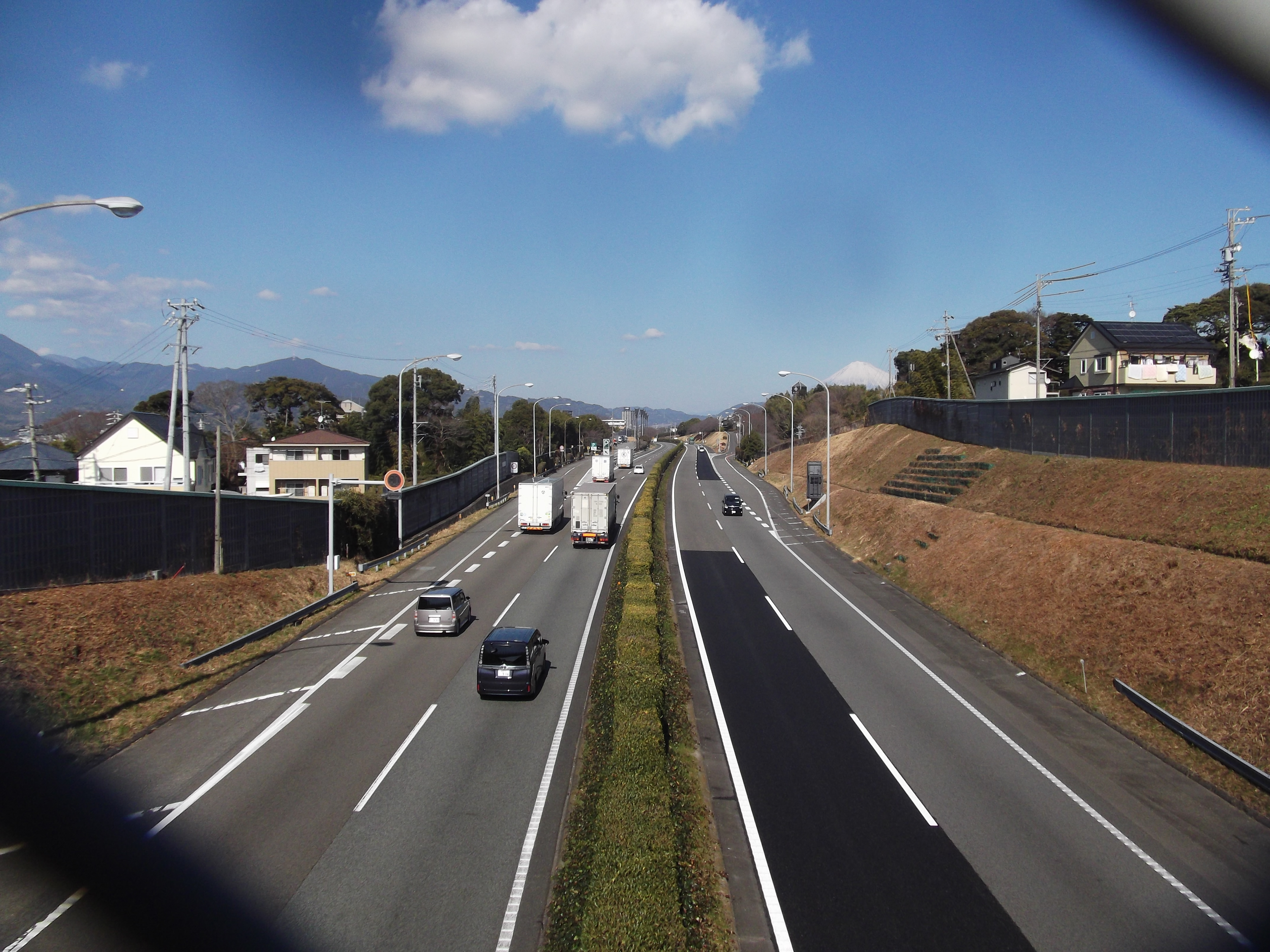 日本平パーキングエリア付近を撮影。